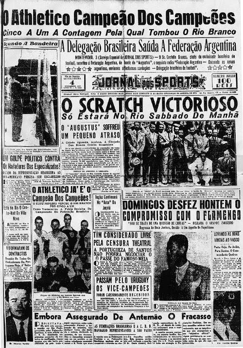 Jornal dos Sports - Rio de Janeiro - 1937 Capa do Jornal dos Sports, Rio de Janeiro, de 04 de fevereiro de 1937. Manchete: Atlético Campeão dos Campeões do Brasil.